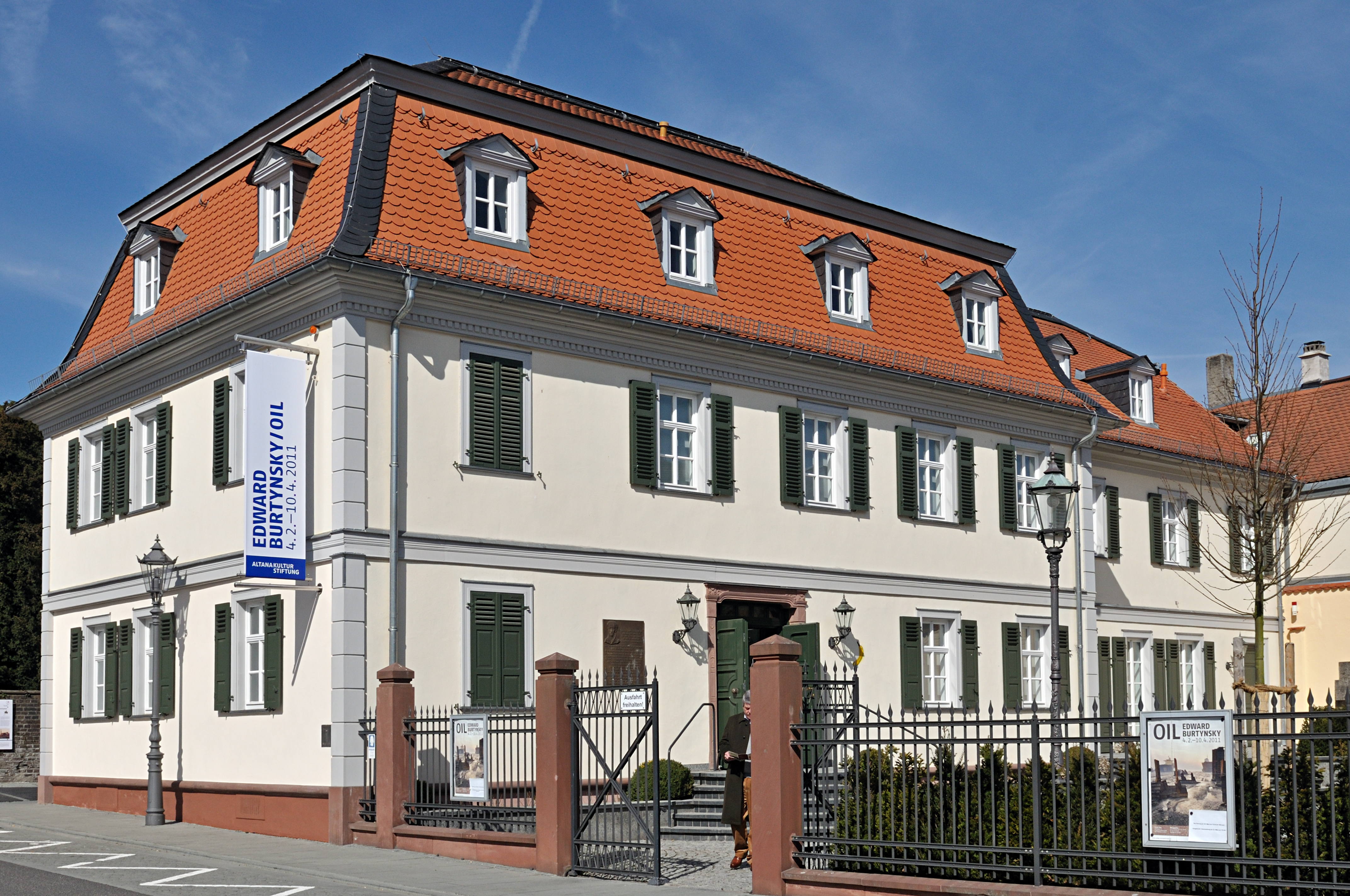 Sinclair-Haus in Bad Homburg vor der Höhe Blick von der Dorotheenstraße